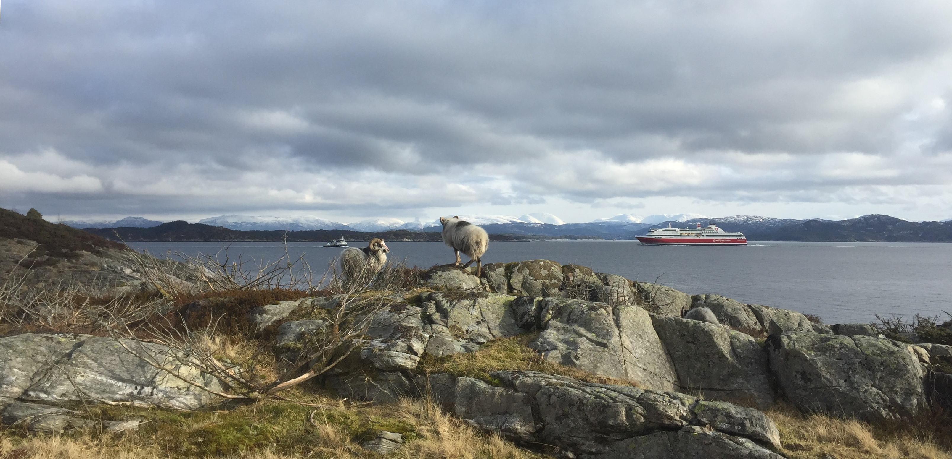 Sauer som beiter på Børneset med Korsfjorden og MF «Stavangerfjord» i bakgrunnen